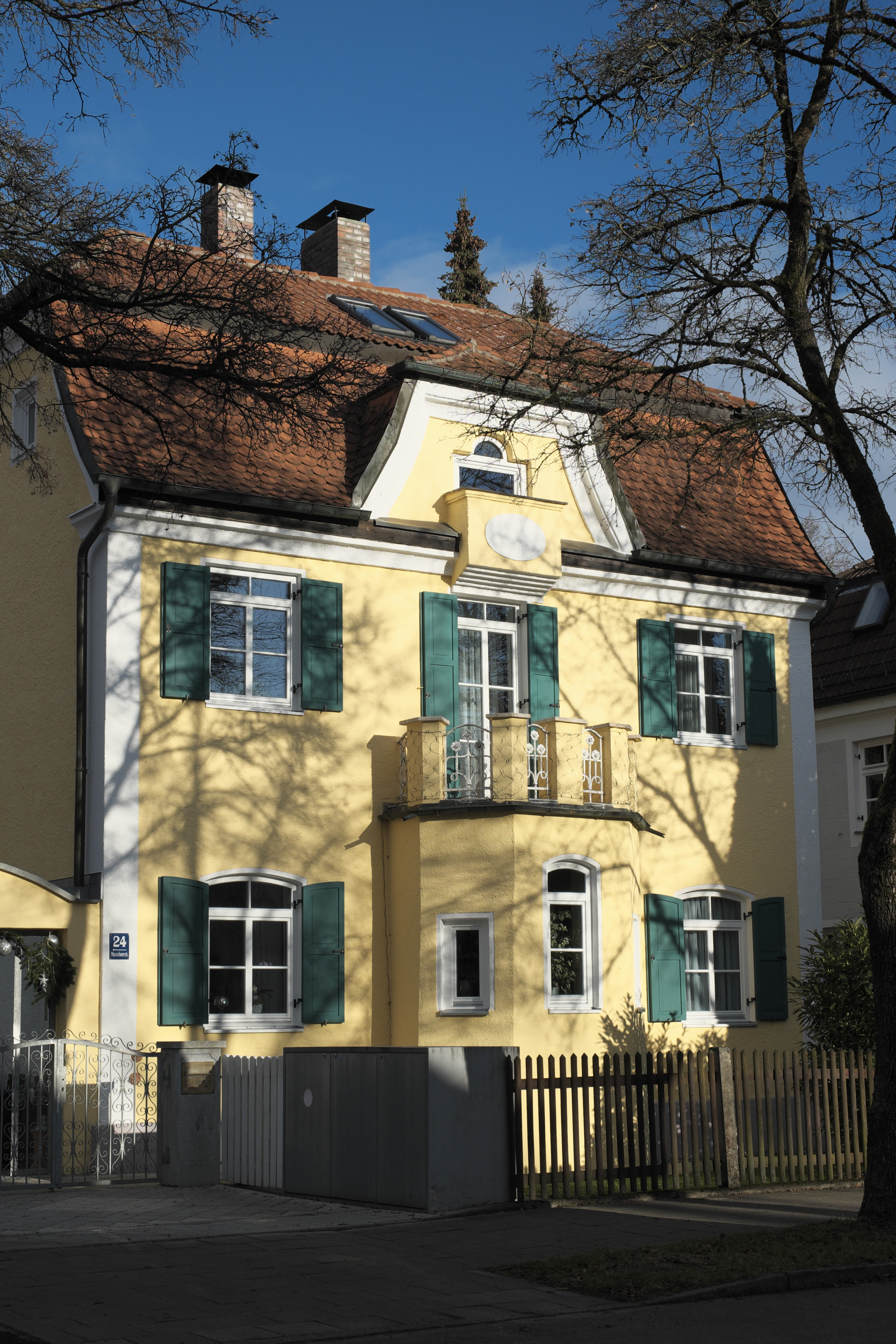 Villa in der Marschnerstraße 24 in Pasing im Stadtbezirk Pasing-Obermenzing in München (Bayern/Deutschland), 1902 von Otto Numberger errichtet